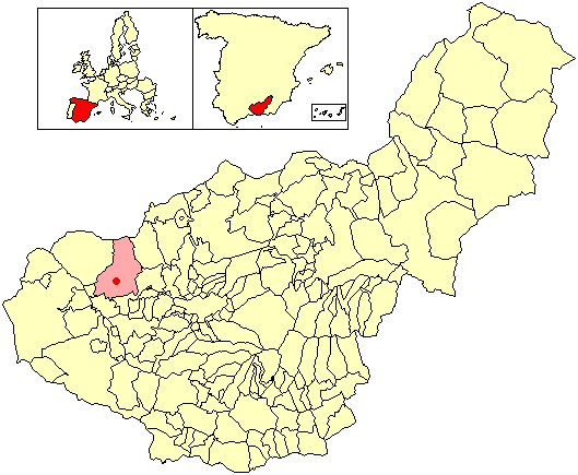 Situación de la localidad de Alomartes (en el municipio de Íllora) respecto a la provincia de Granada, en España.